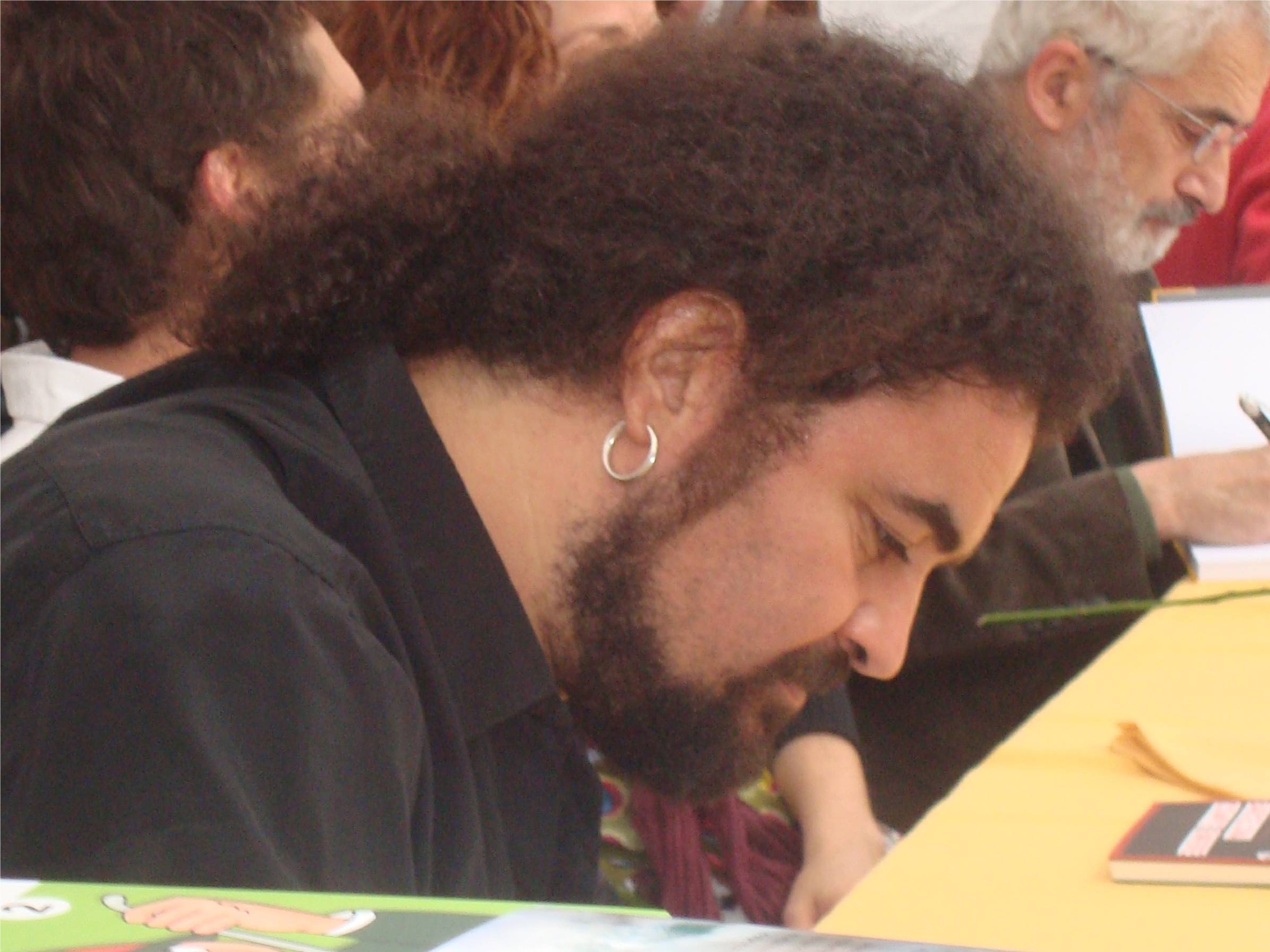 El Sevilla, vocalista dels Mojinos Escozíos, signant llibres per Sant Jordi.